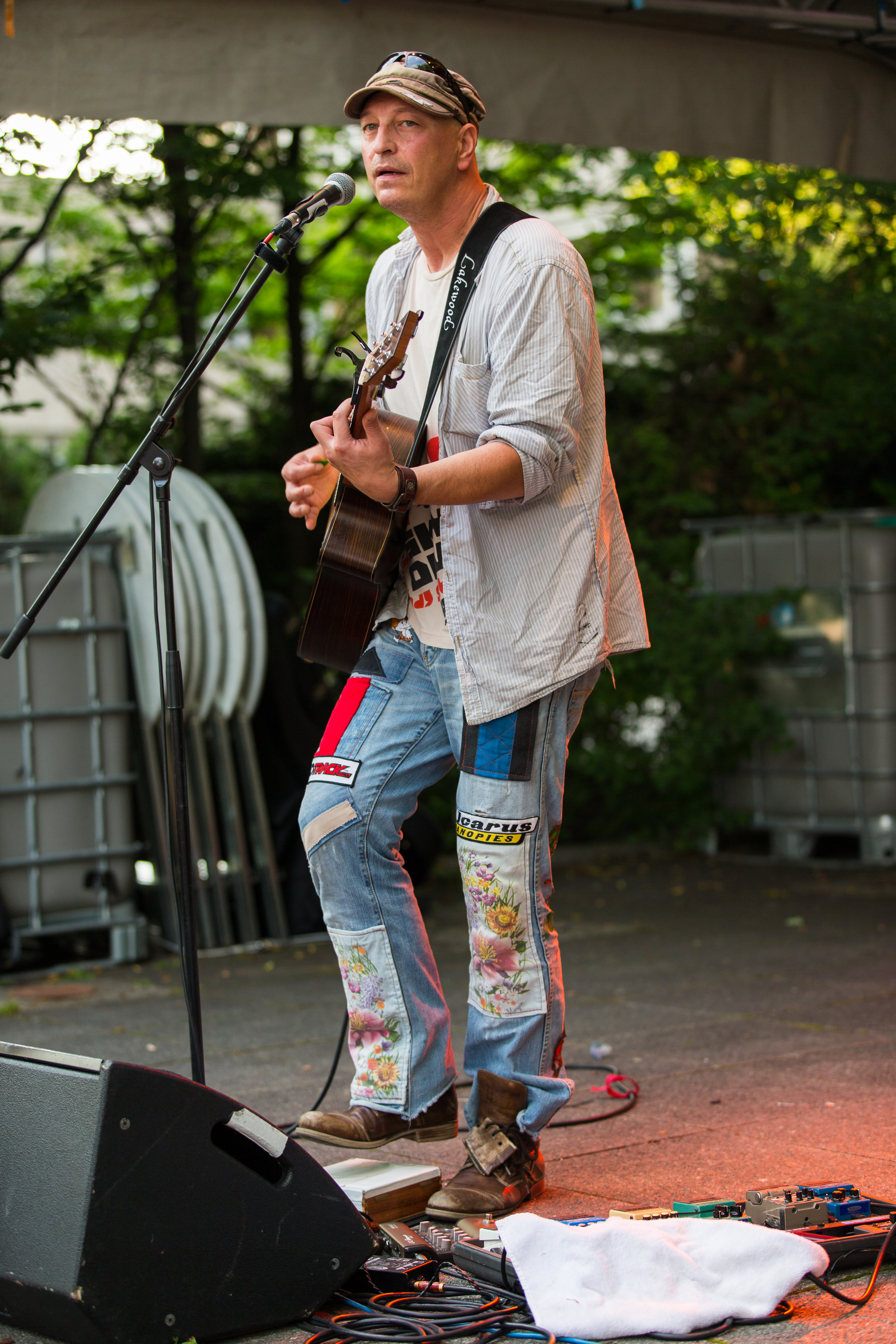 Robert Carl Blank bei Sommerbühne Viernheim 2015